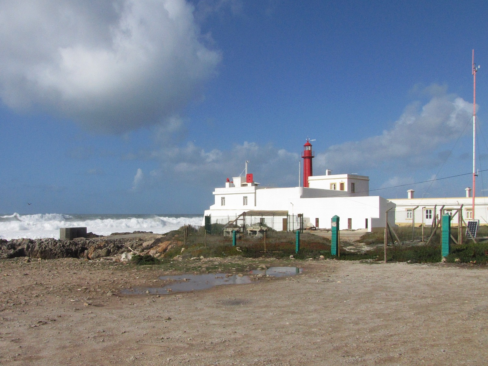 Farol do Cabo Raso (Leuchtturm) in der Festungsanlage von 1894 mit dem Leuchtturm von 1905 23 m üNN an N247 westlich Cascais Foto Wolfgang Pehlemann Steinberg/Ostsee IMG_8567